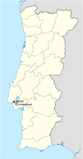 Mapa Santo Condestável